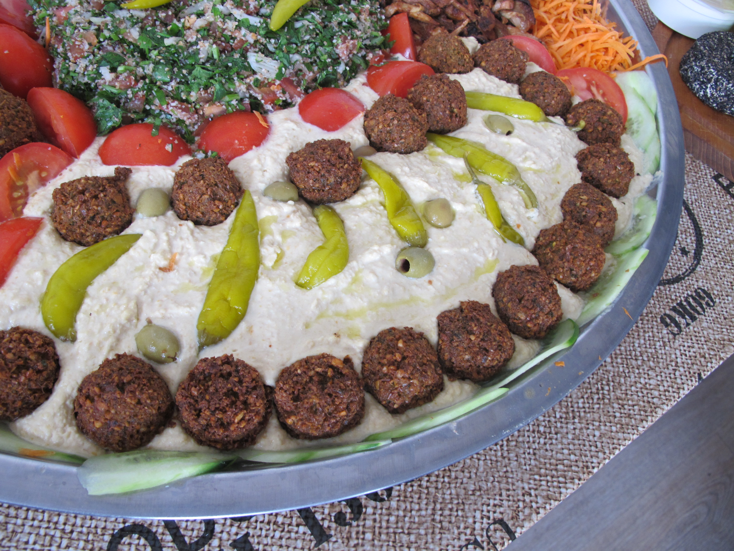 Das gab es zu Essen (Detail)